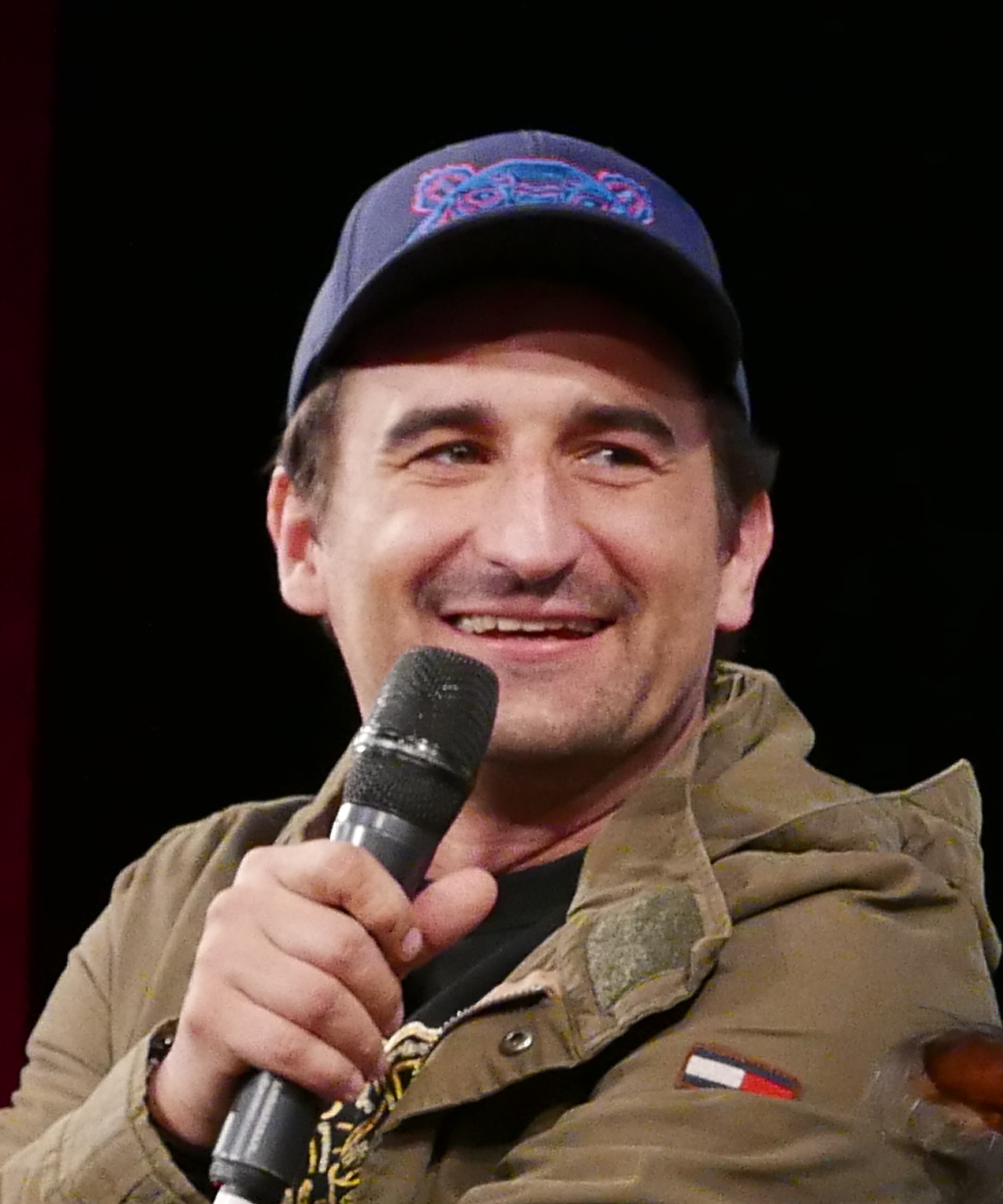 Michał Koterski, aktor, na festiwalu filmowym Kino na Granicy w Cieszynie, 2019